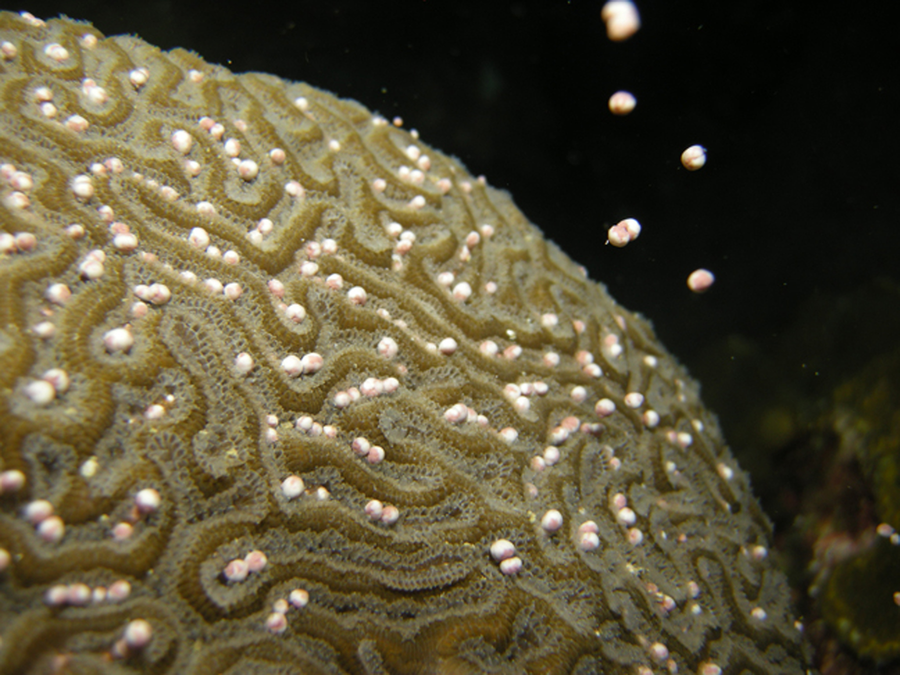 Pseudodiploria strigosa, desovando en el Santuario Nacional Marino de Flower Garden Banks